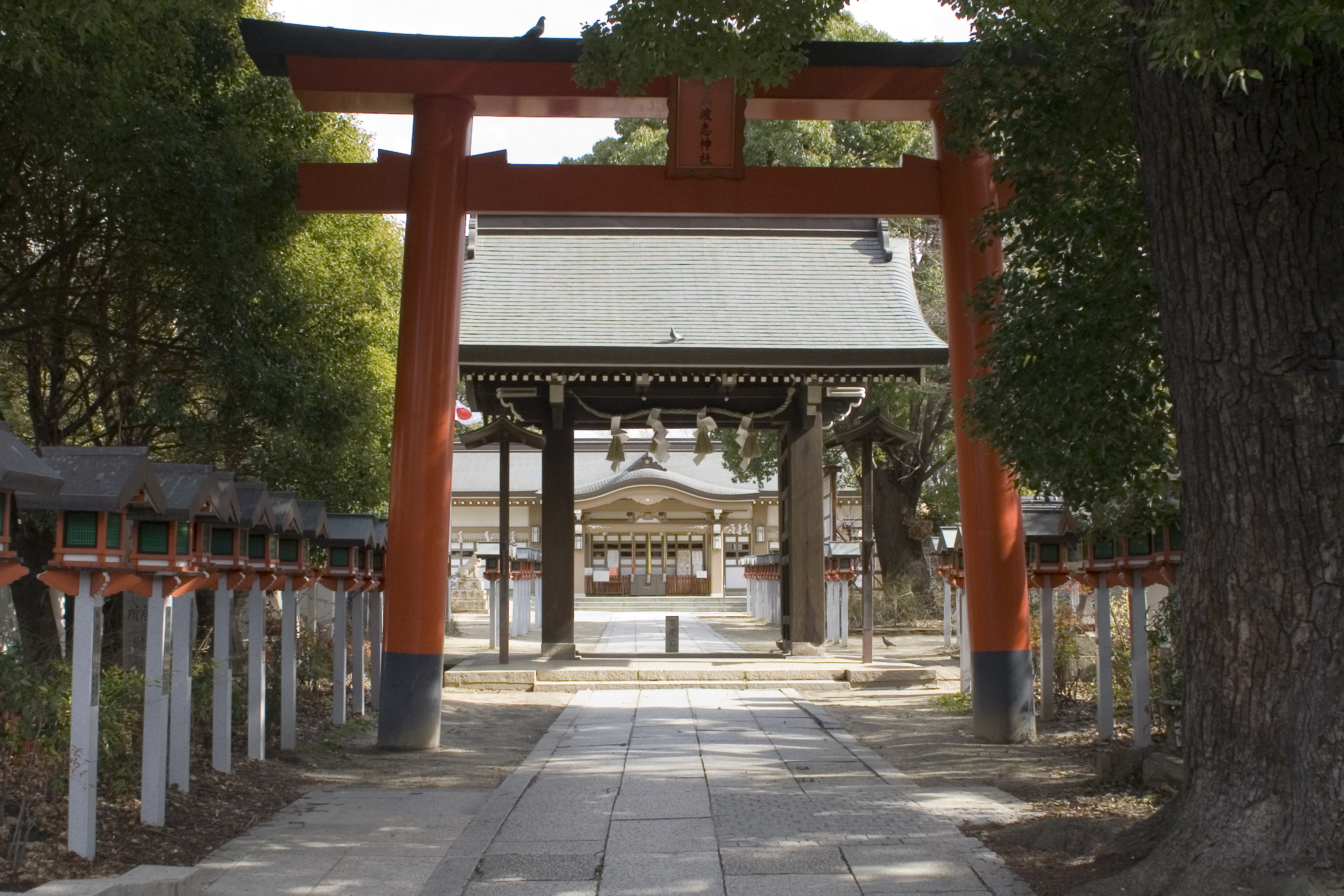 香具波志神社